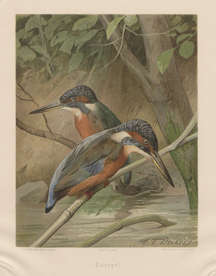 Chromolithographie aus der Serie „Jagdbare Thiere“ von Carl Friedrich Deiker Eisvögel. n. Zeichn. v. Ad. Müller